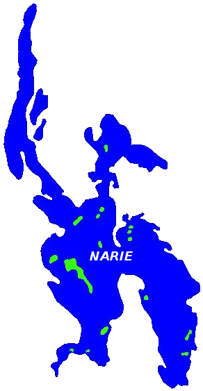 Plan jeziora Narie